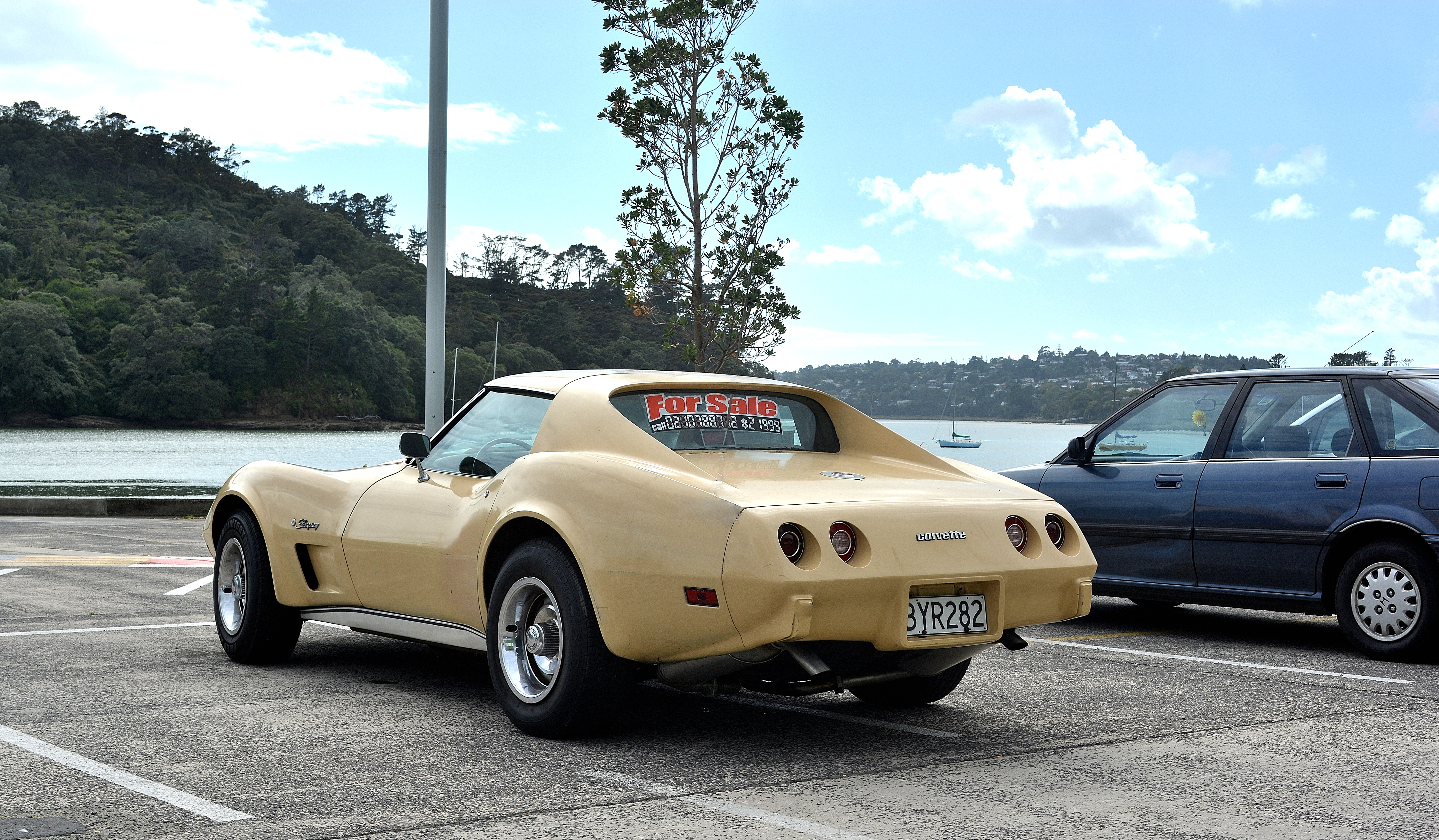 1975 Chevrolet Corvette